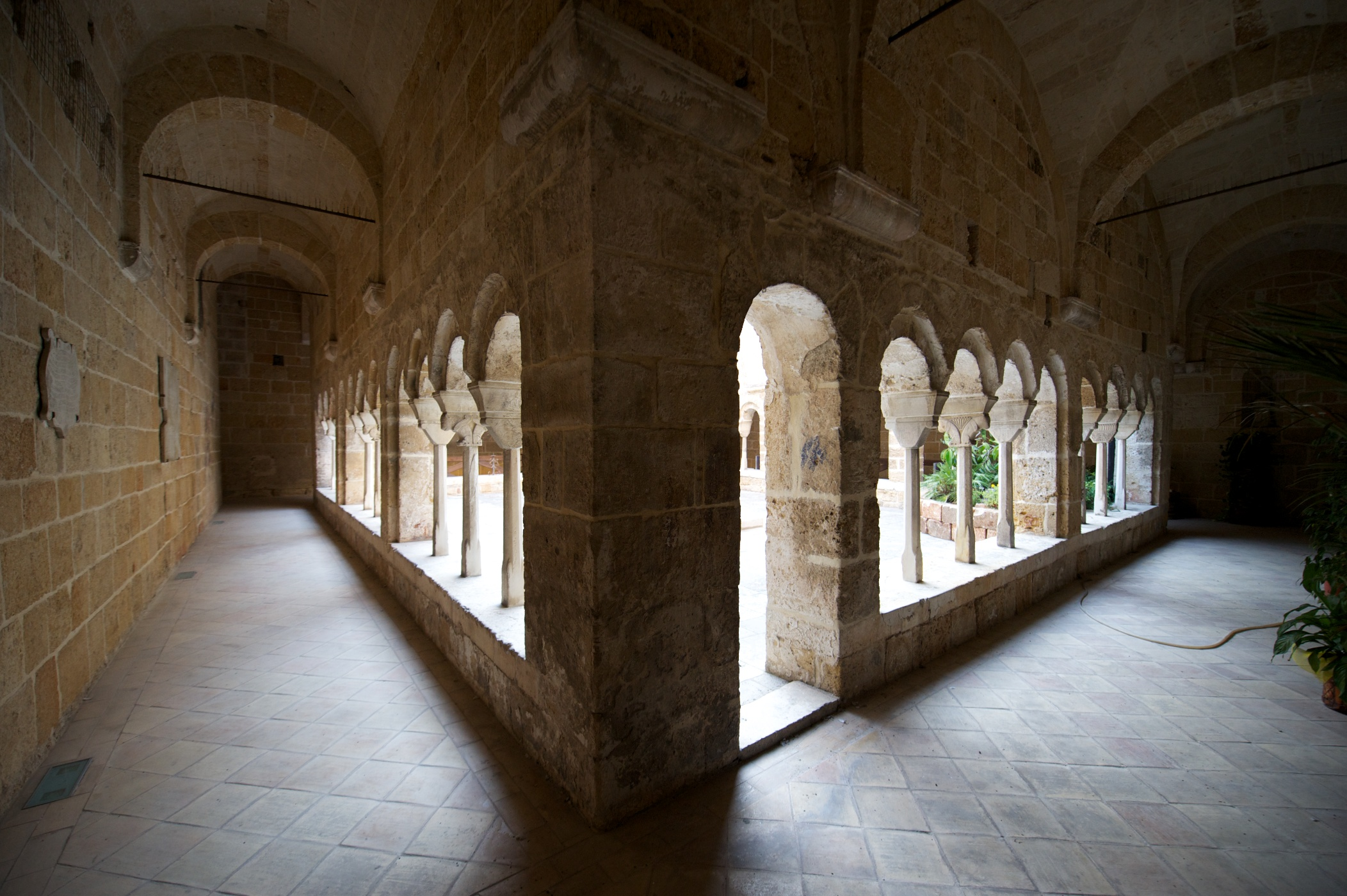 Ambulacro del chiostro della Ex Abbazia di San Benedetto a Brindisi